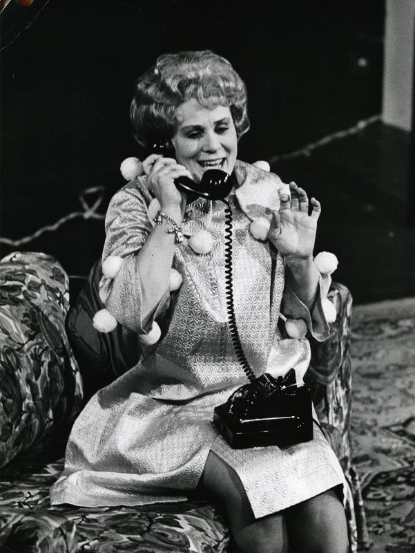 Ingrid Borthen i Ostron och politik på Helsingborgs stadsteater.